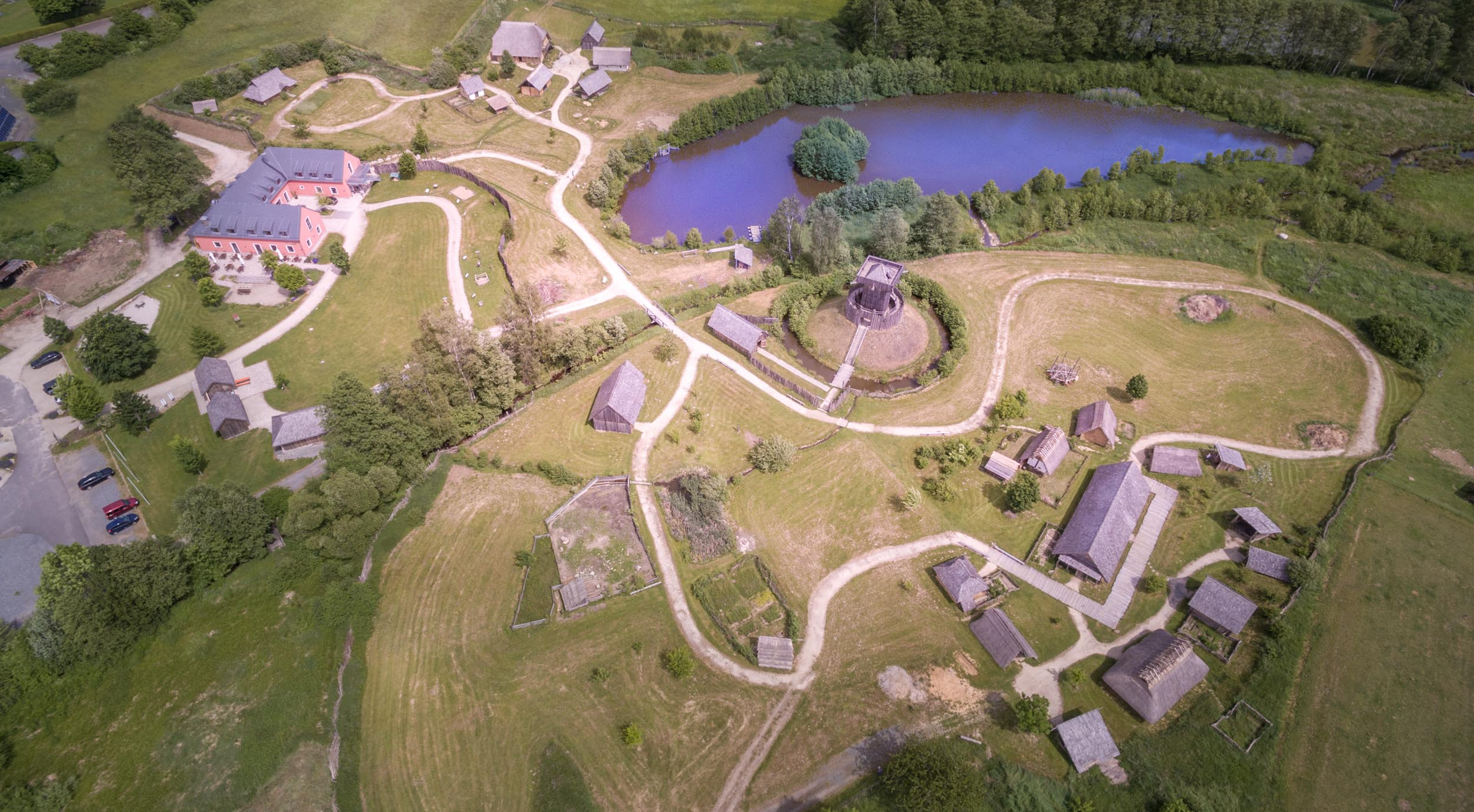 Geschichtspark Bärnau-Tachov im Jahr 2017